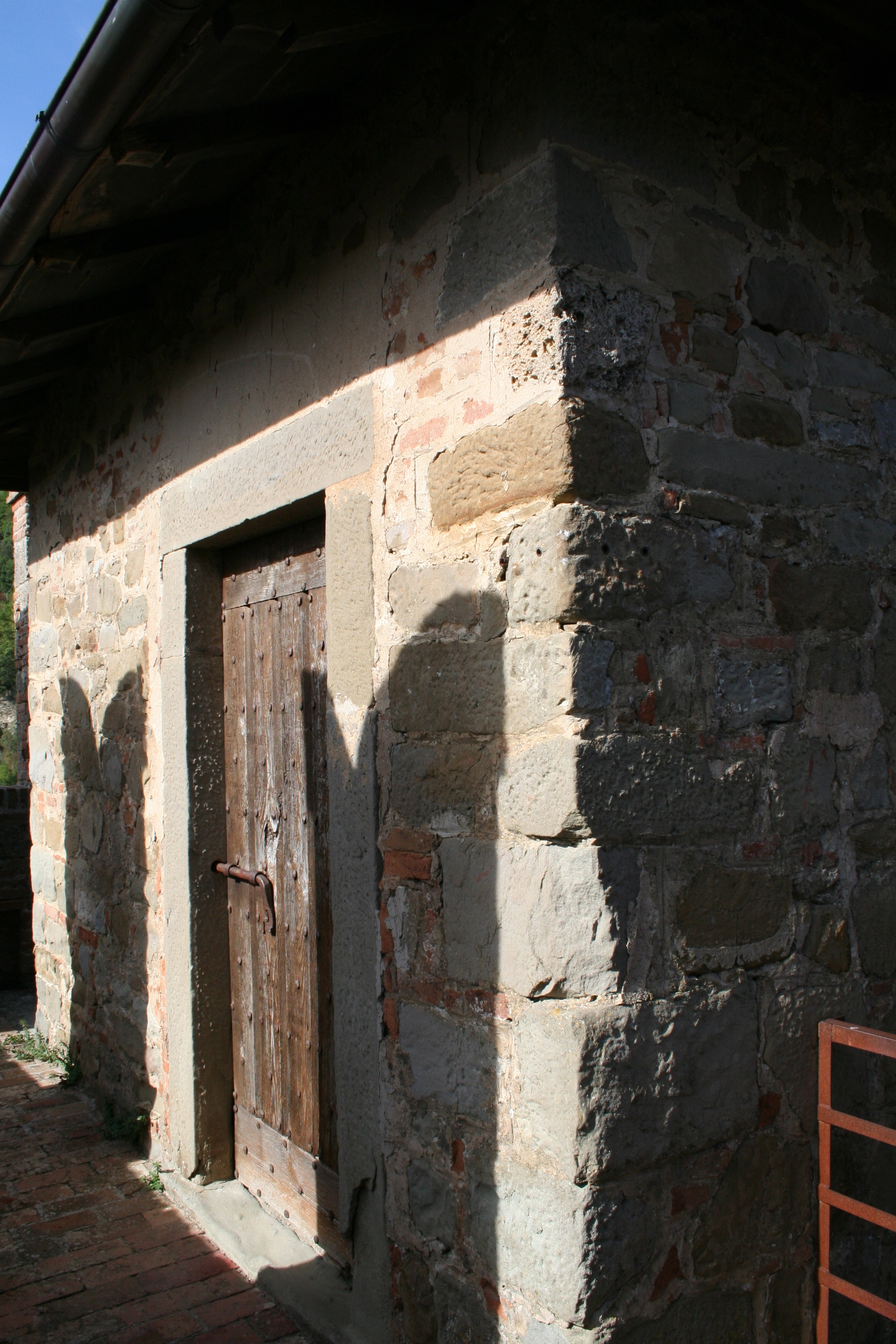 Rocca di Arquata del Tronto (AP) - Stanza sulla sommità del mastio